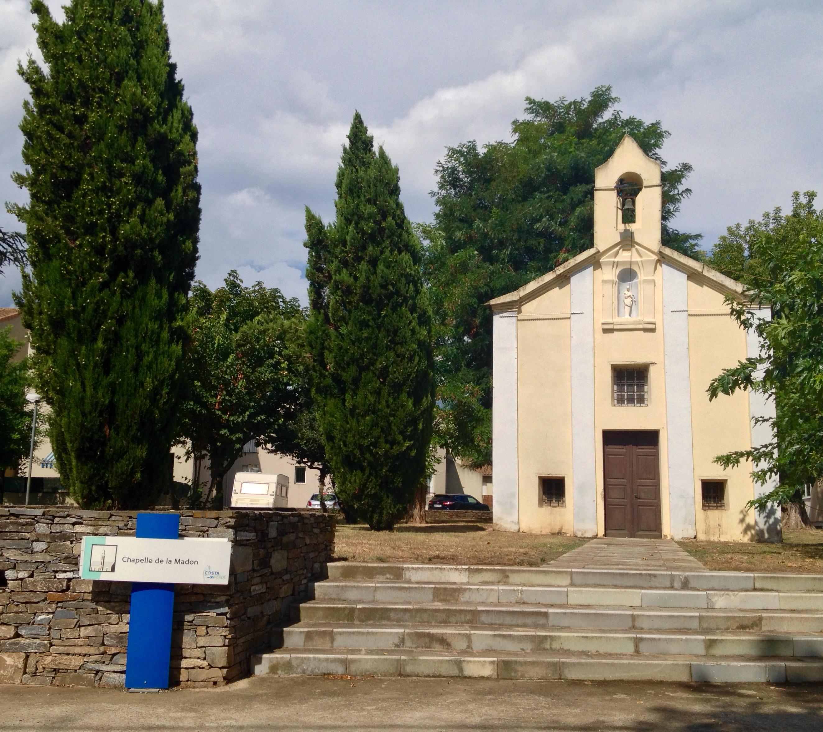 La Chapelle de la Madonne